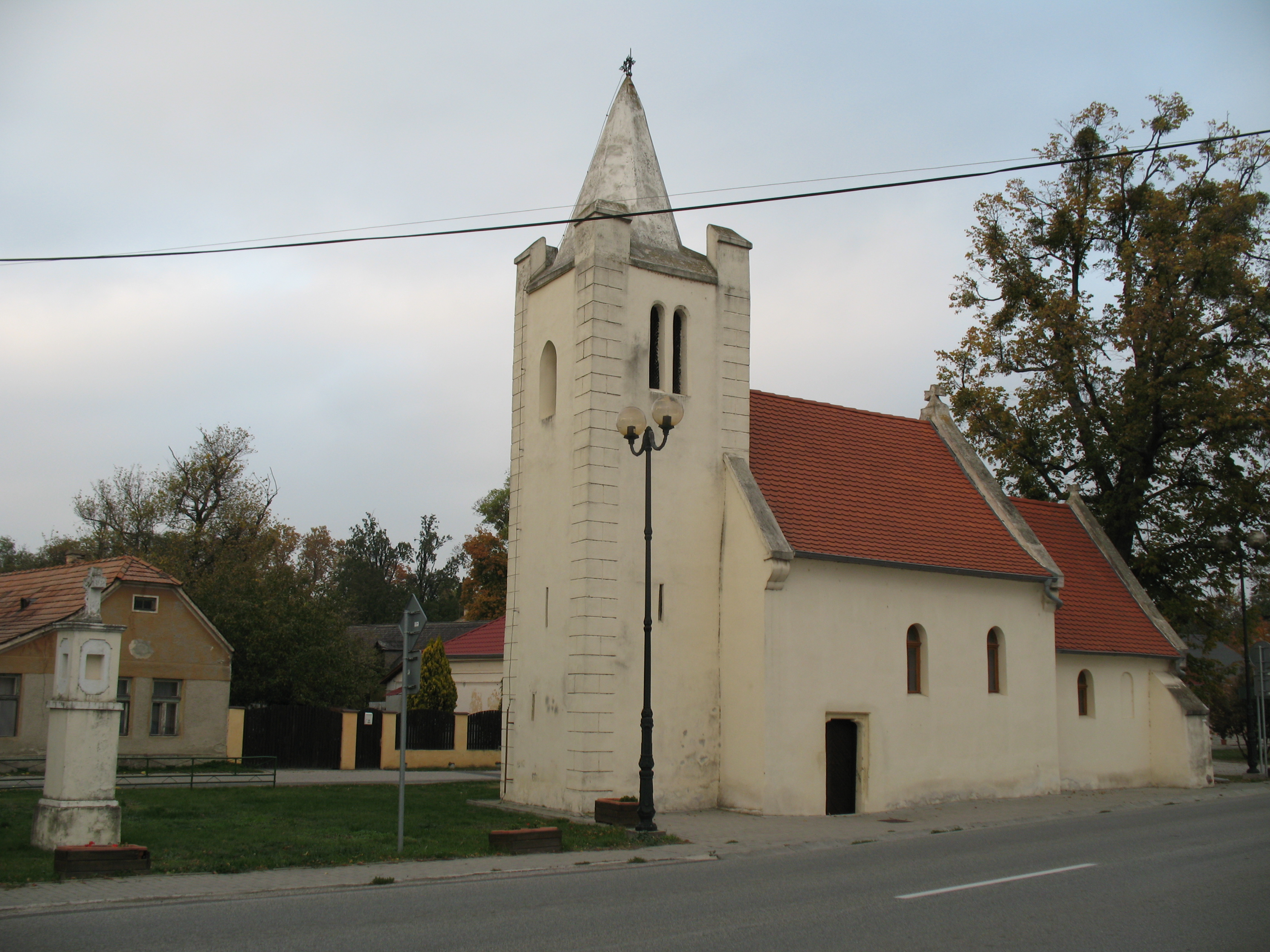 Nemesgomba